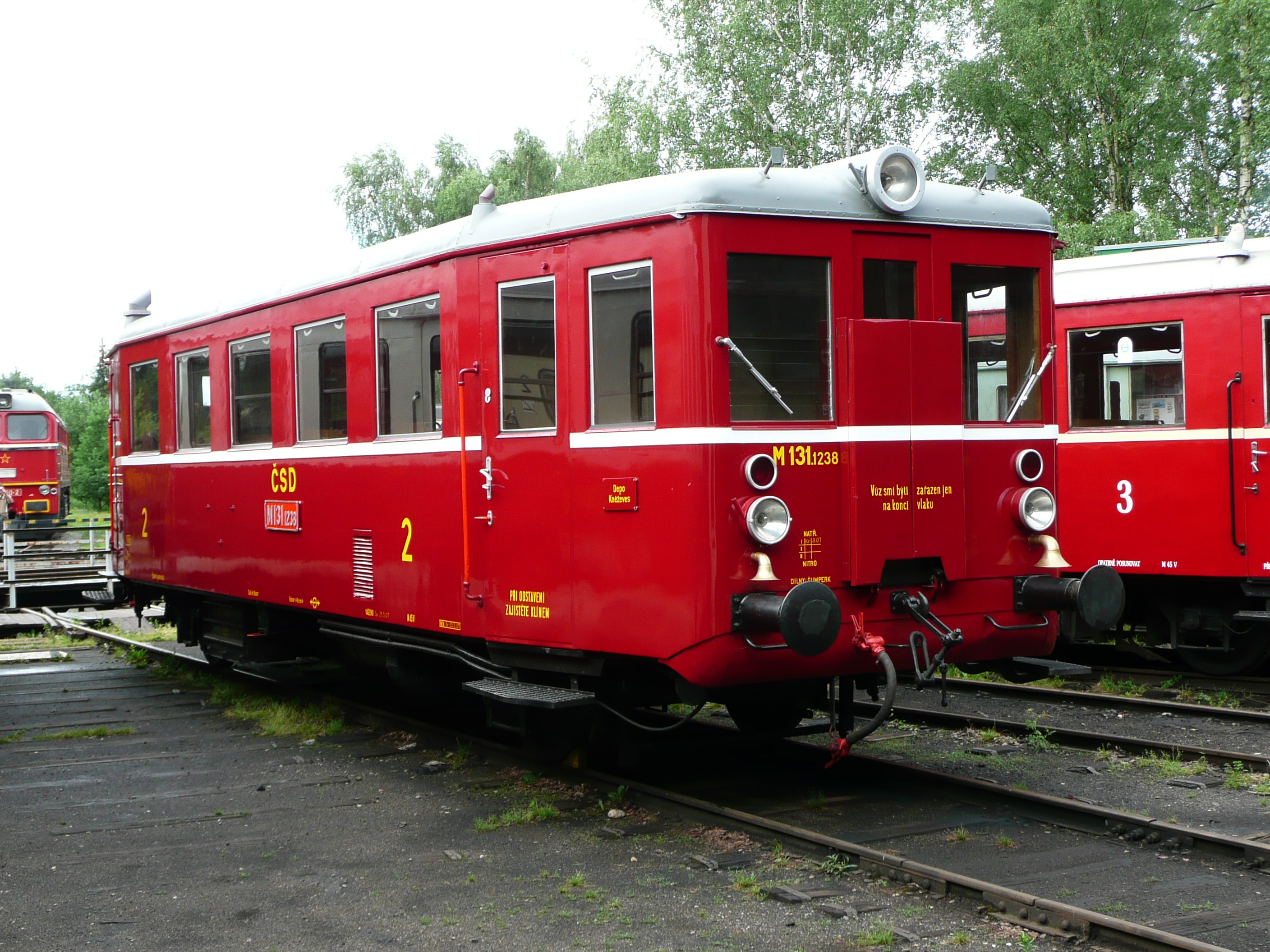 M 131.1238 im Eisenbahnmuseum Lužná u Rakovníka